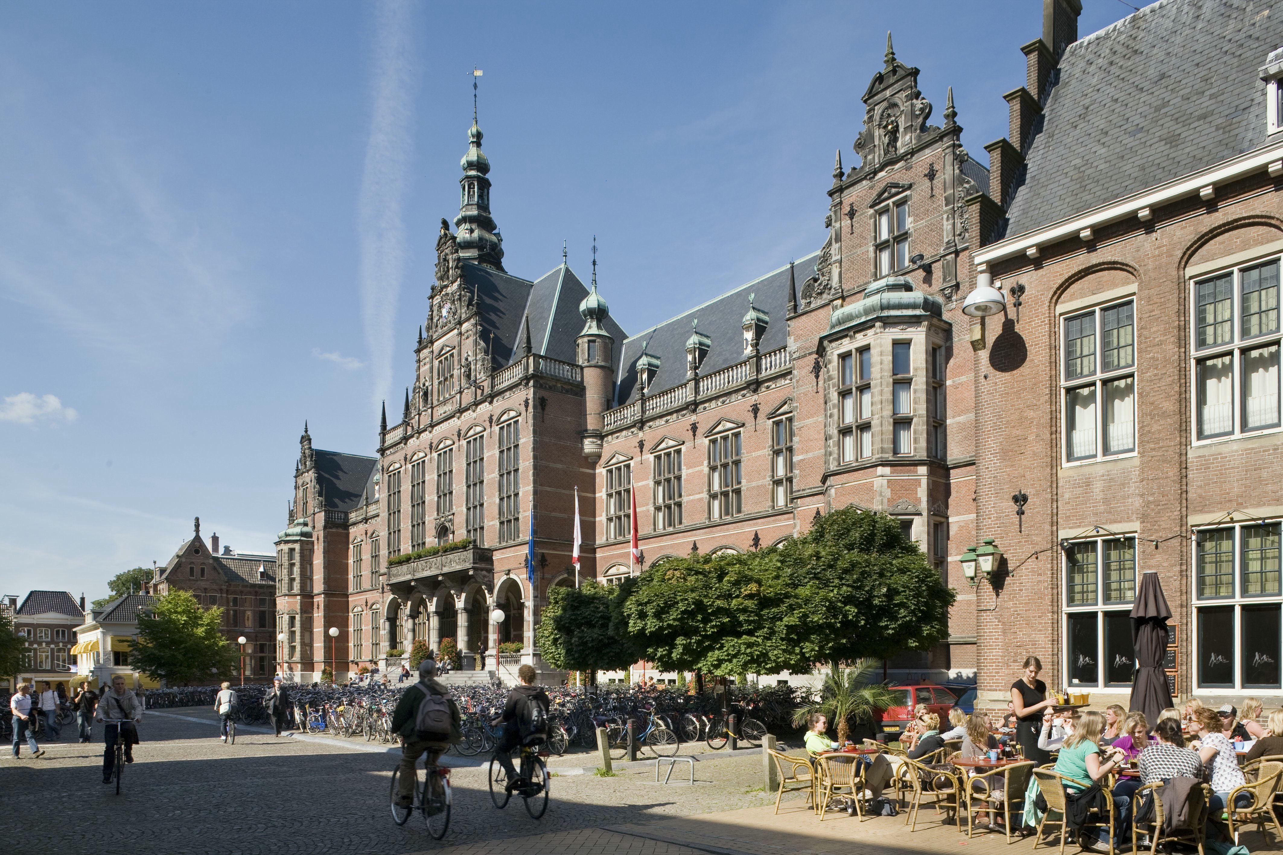 Universiteitsgebouw: Overzicht van de voorgevel met ingangspartij en bordestrap, fietsers, fietsenstalling en drukbezet terras op de voorgrond